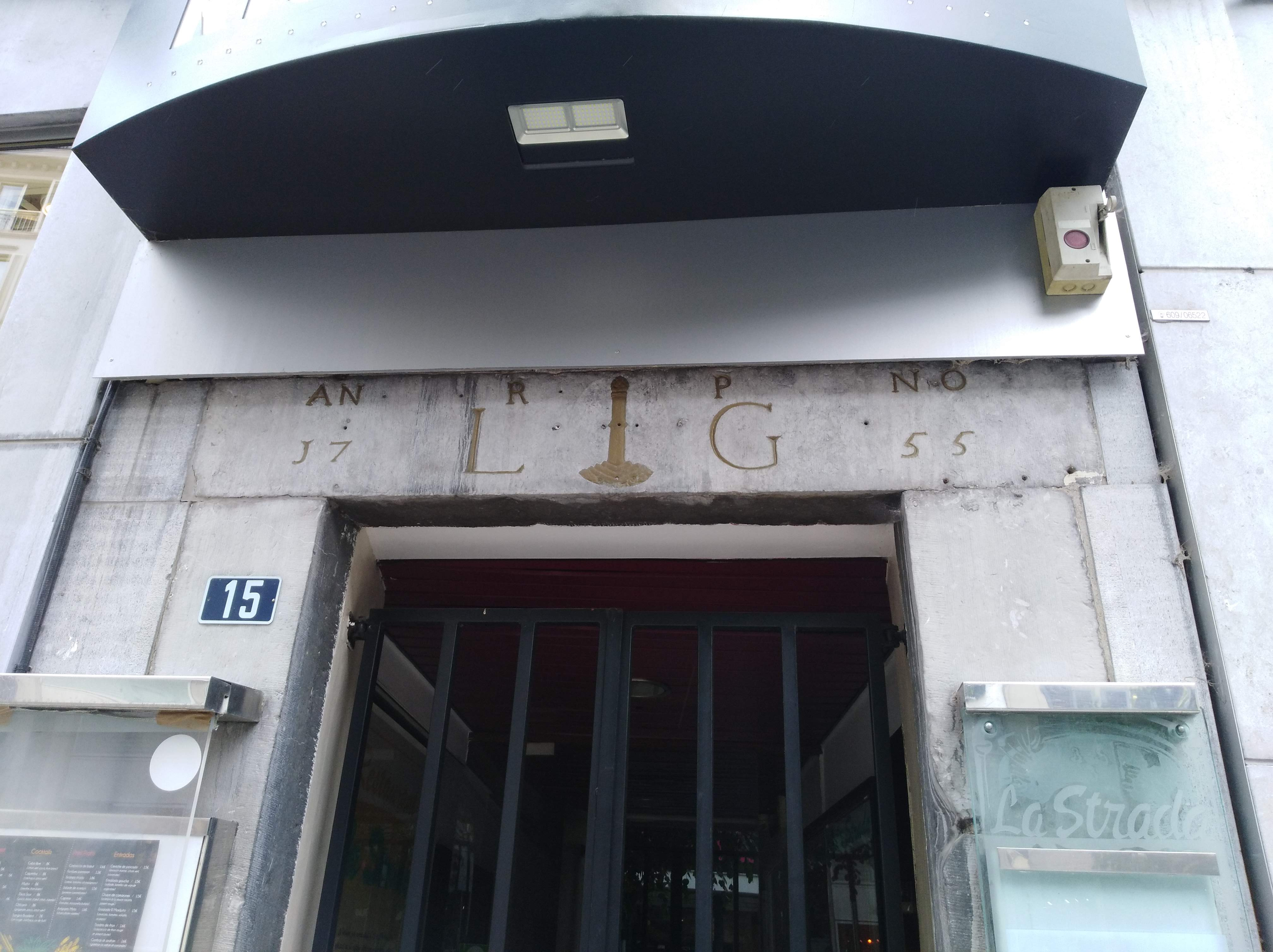 Vinave d'Ile n015